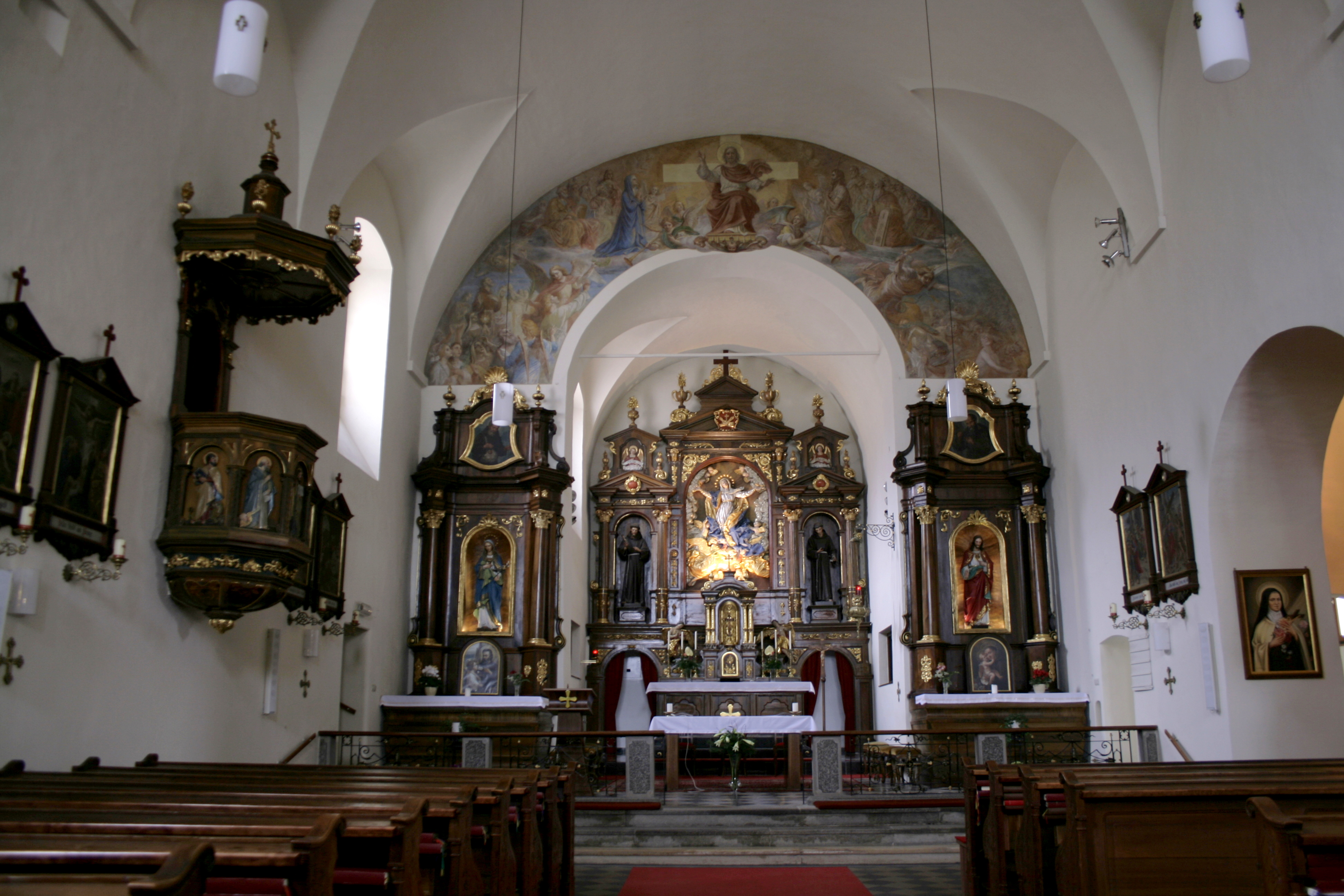 Hartberg Klosterkirche Innenansicht mit Hochaltar